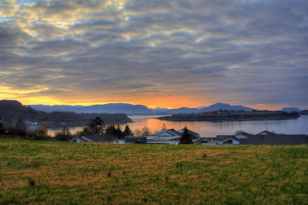 HDR 3 eksp. håndholdt ,Photomatix